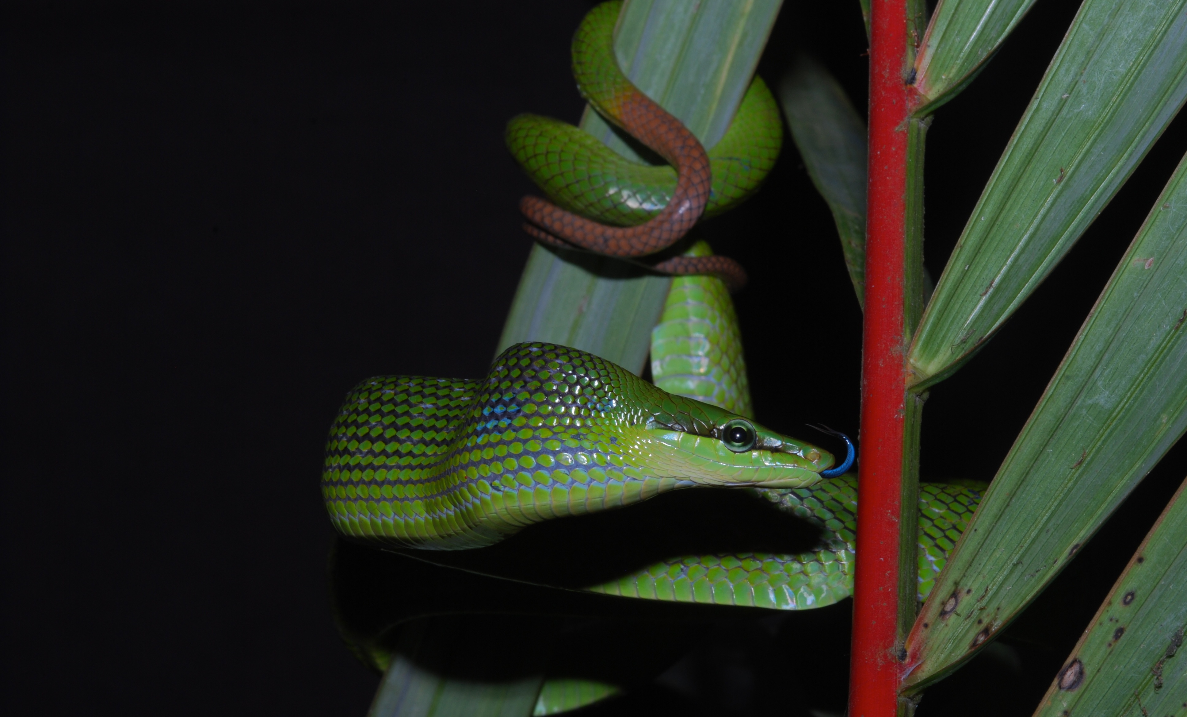 Taman Negara NP, Pahang, MALAYSIA